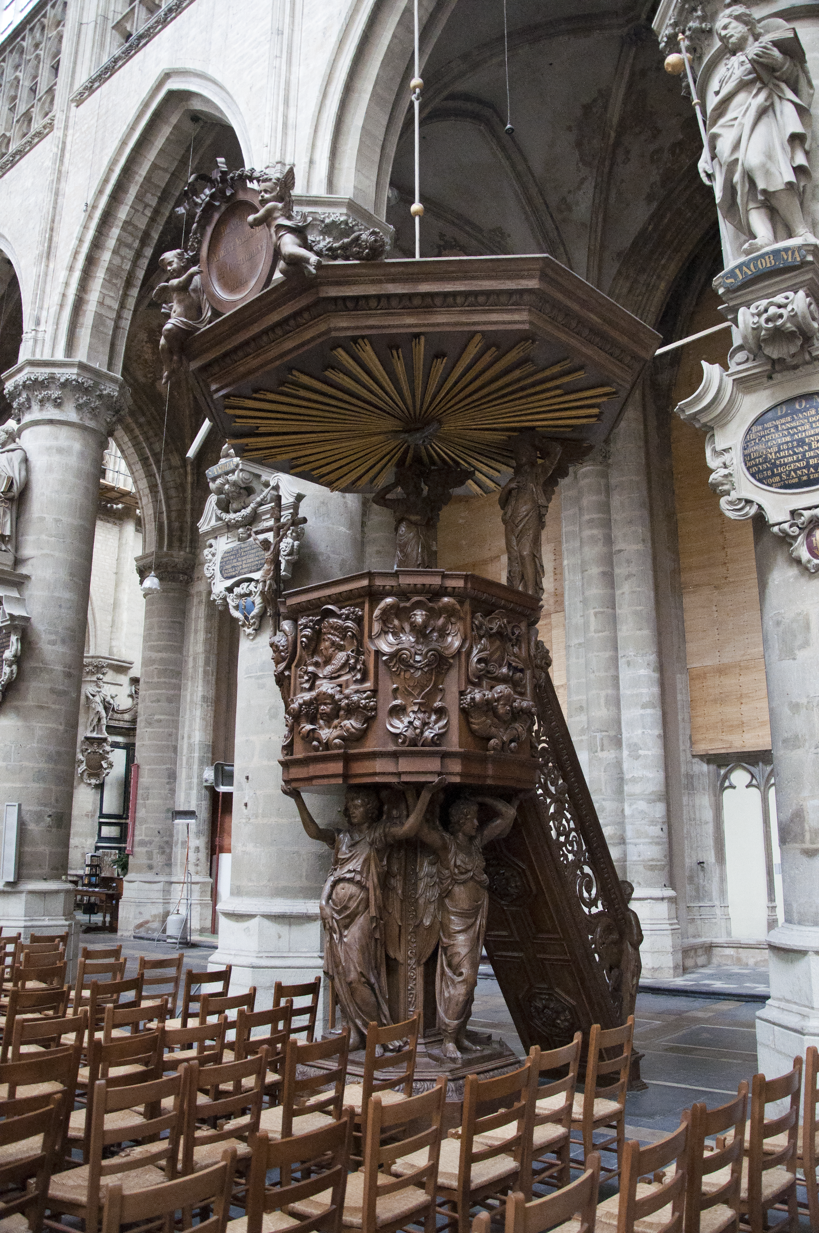 Preekstoel in de Sint-Gummaruskerk van Lier, België, gedragen door vier aartsengelen van Erasmus Quellinus I